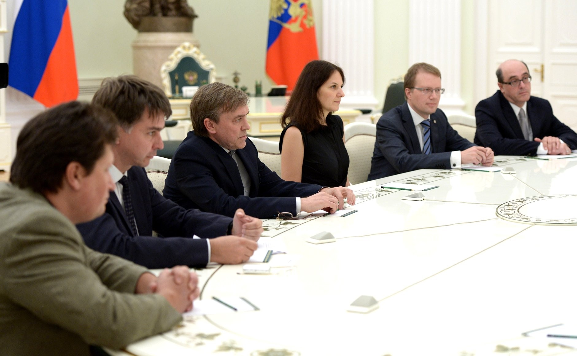 Во время встречи с учёными – получателями мегагрантов на научные исследования.